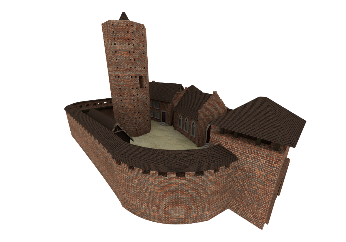 Wizualizacja ta jest próbą rekostrukcji bryły zamku w Bolesławcu z końca XIV wieku.